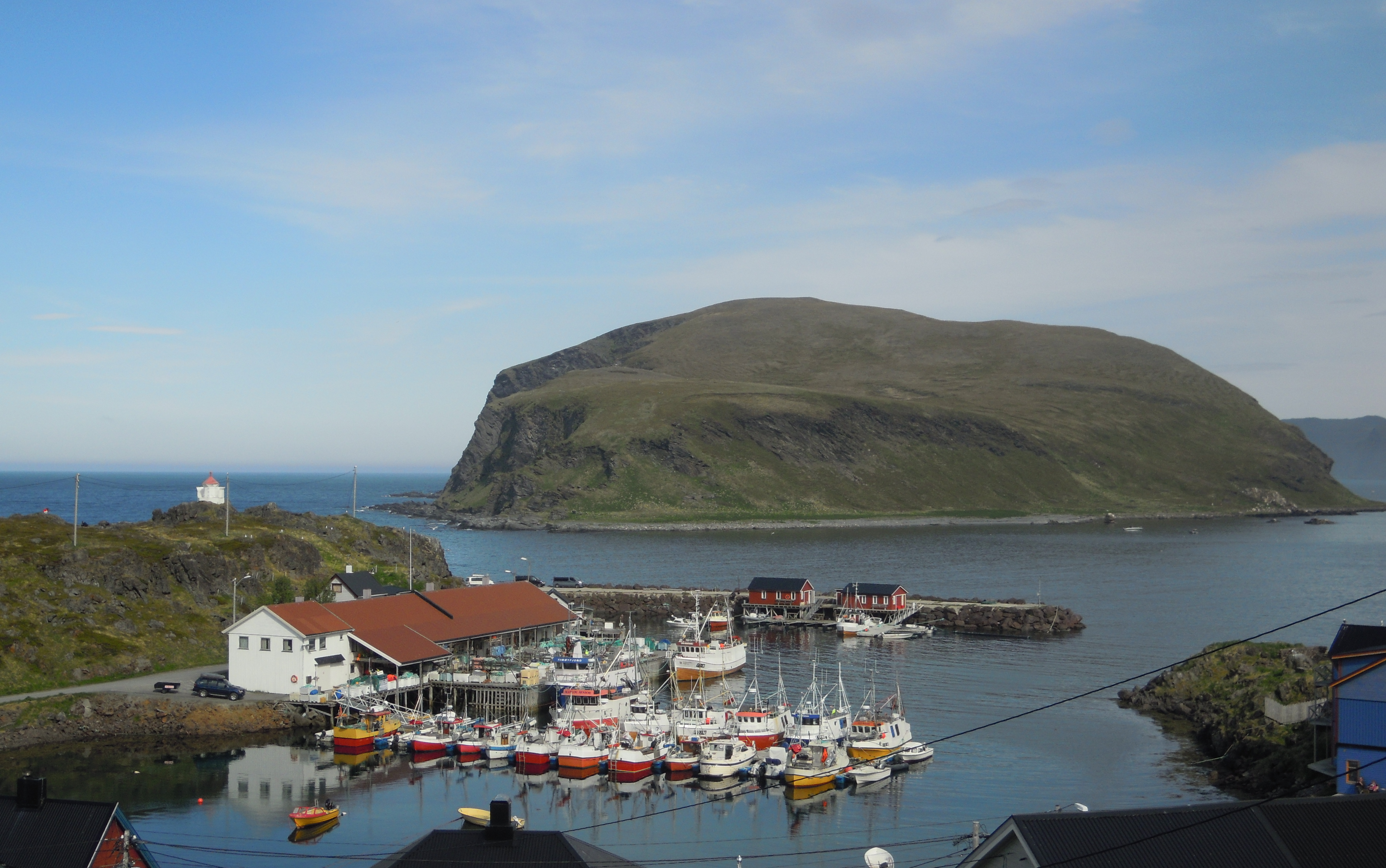 Store Kamøya (Gáhpesuolu), Kamøyvær, Nordkapp kommune. You are free to use this picture outside Wikipedia (see license), as long as you write: Photo: Arnstein Rønning